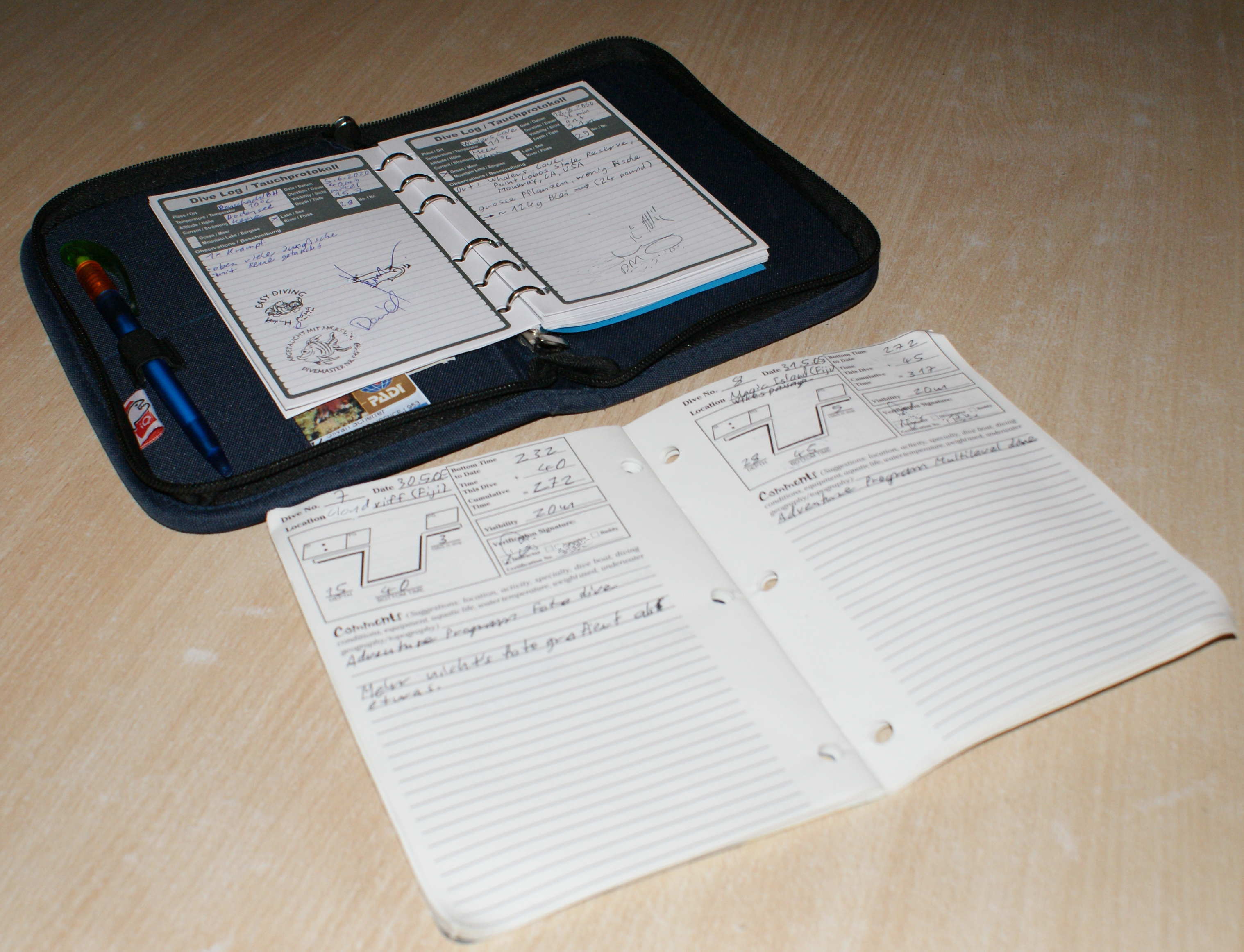 Zwei unterschiedliche Taucher-Logbücher